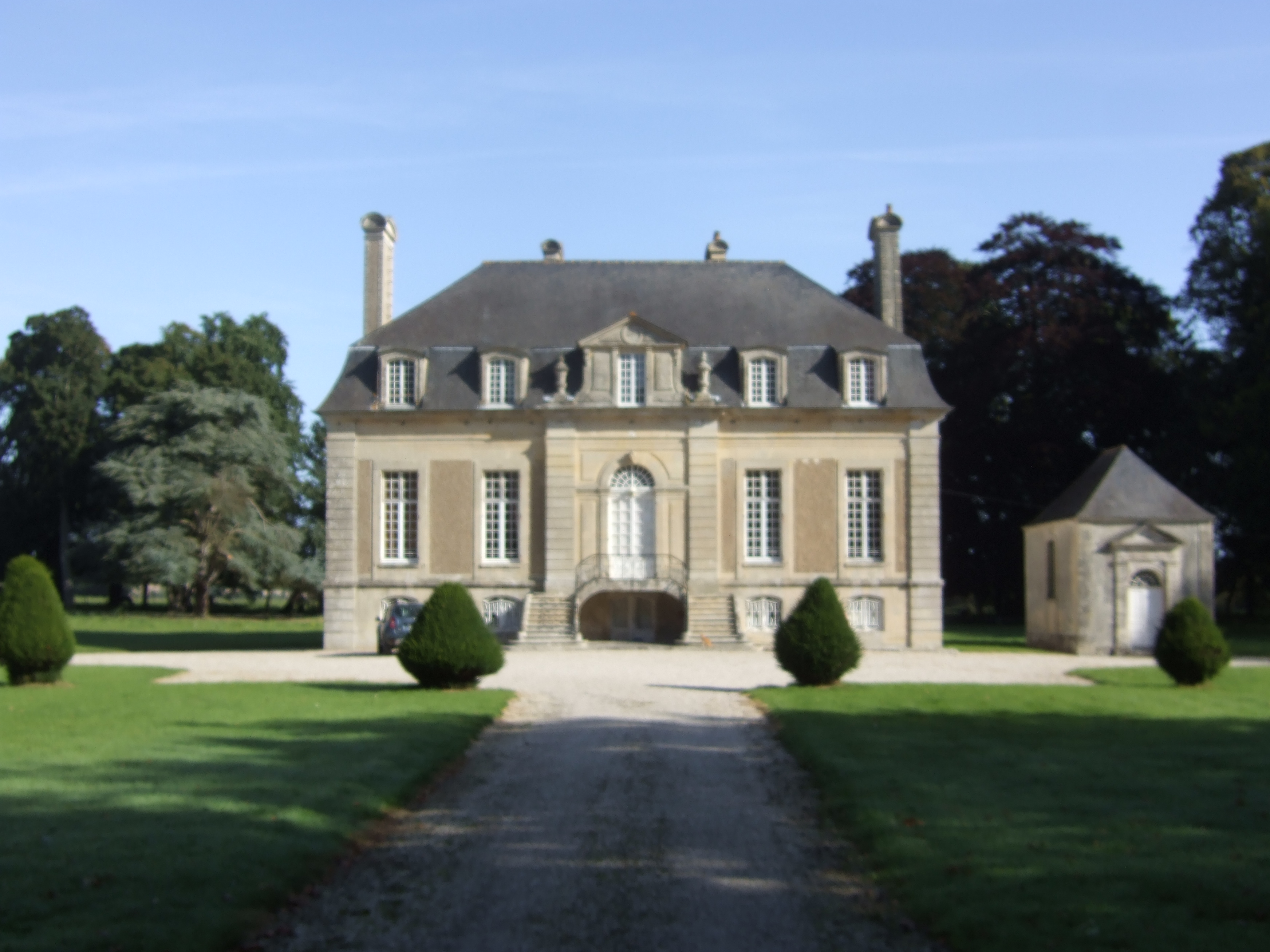 Château de Vaulaville à Tour-en-Bessin .